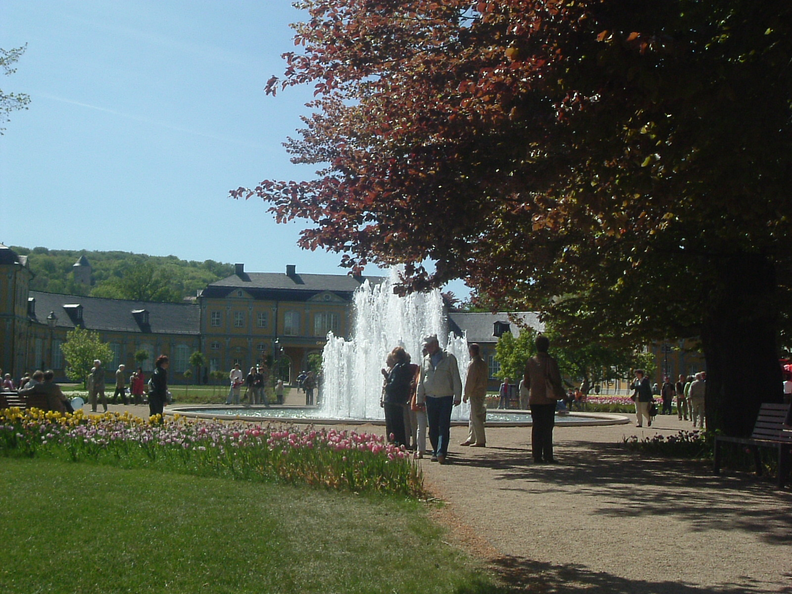 Küchengarten, Gera, Germany